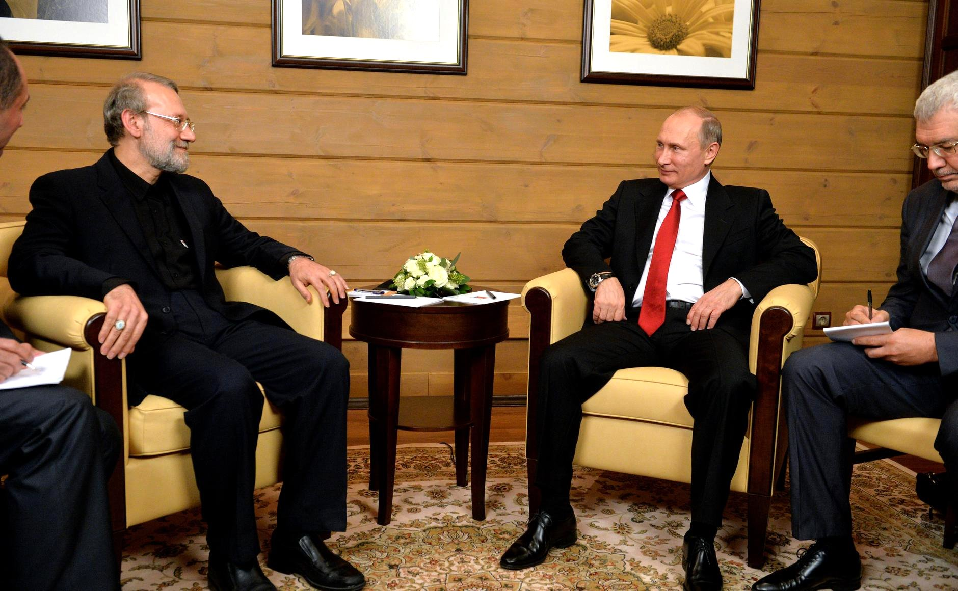 Беседа президента России Владимира Путина со спикером Исламского консультативного совета (парламента) Исламской Республики Иран Али Лариджани